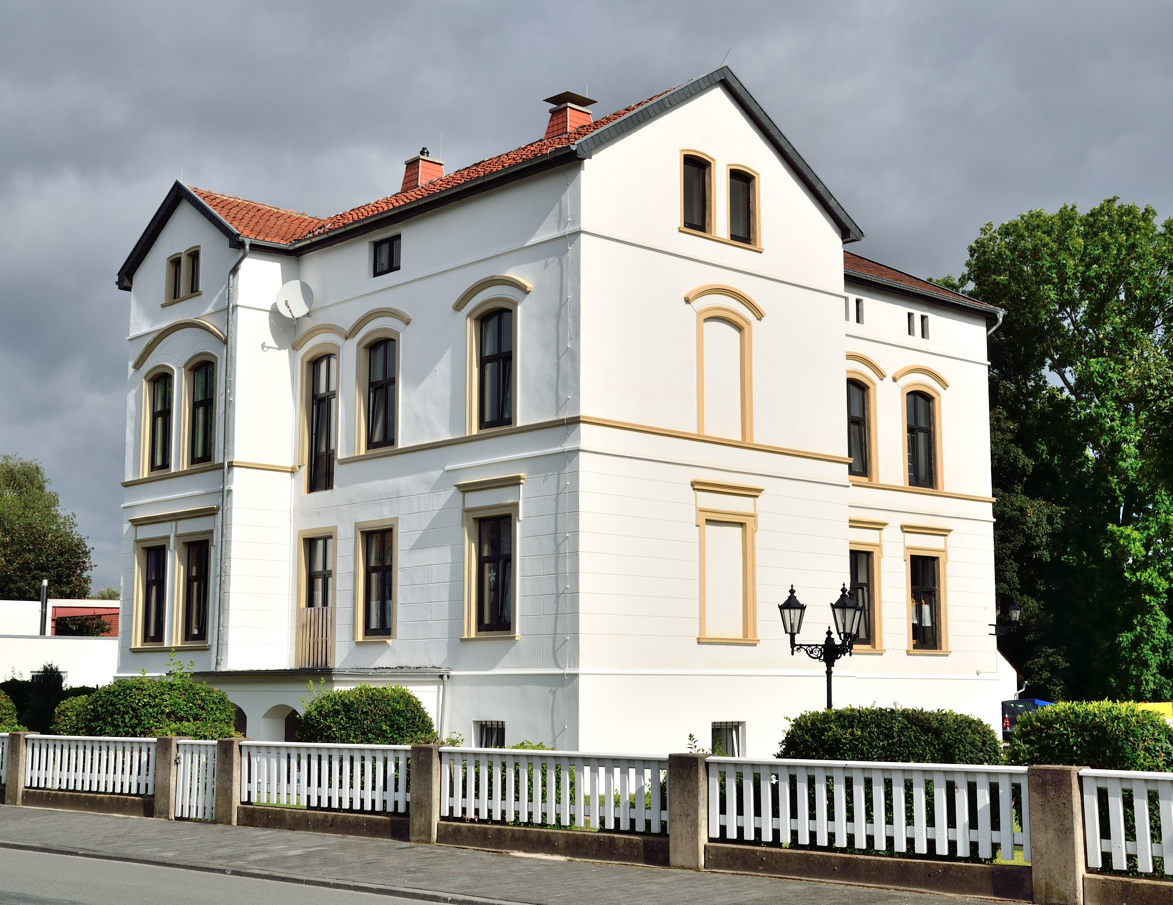 ehemalige "Villa Strobel" in der Detmolder Arminstraße